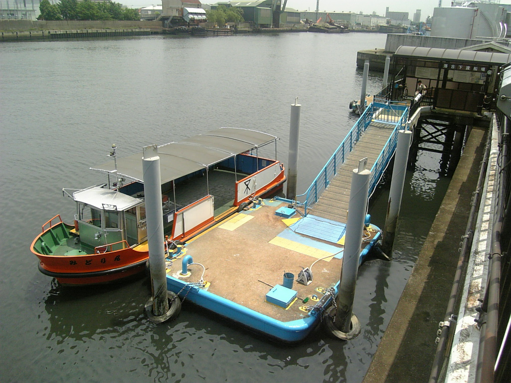 大阪市の公営渡船（落合下渡船）